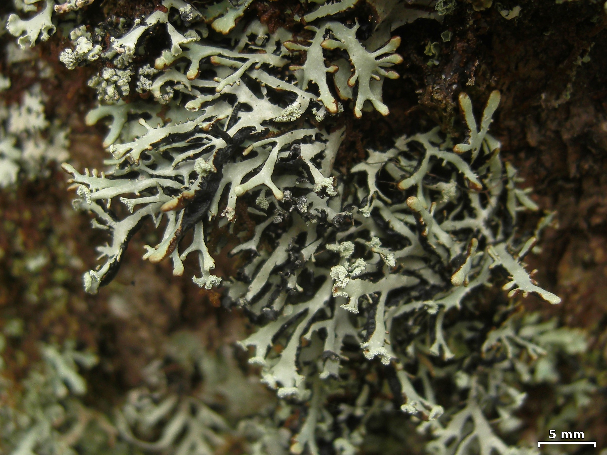 Mount Leconte, Smokies, Tennessee, 20110602